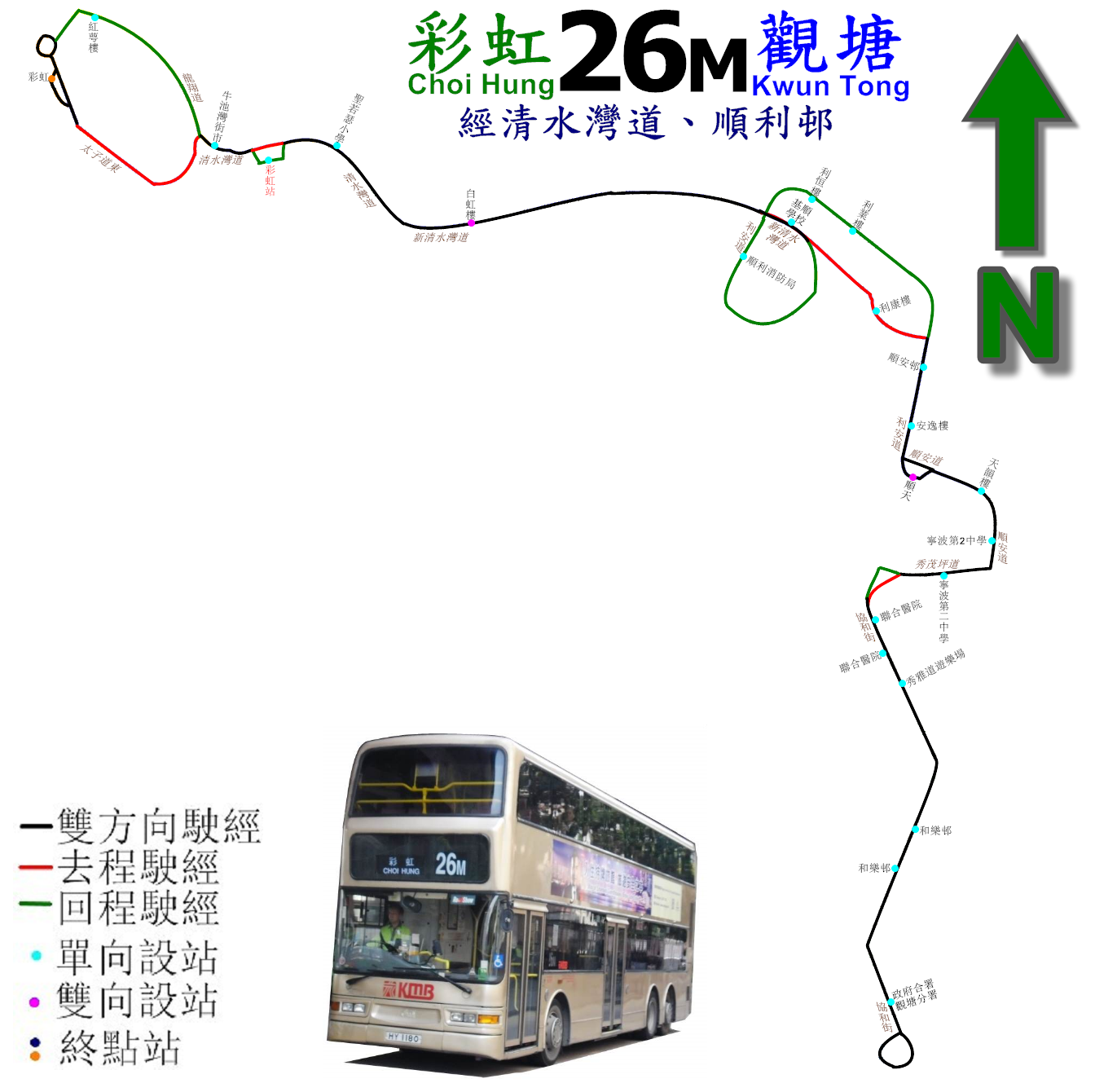 中文（香港）: 九巴26M線的走線圖